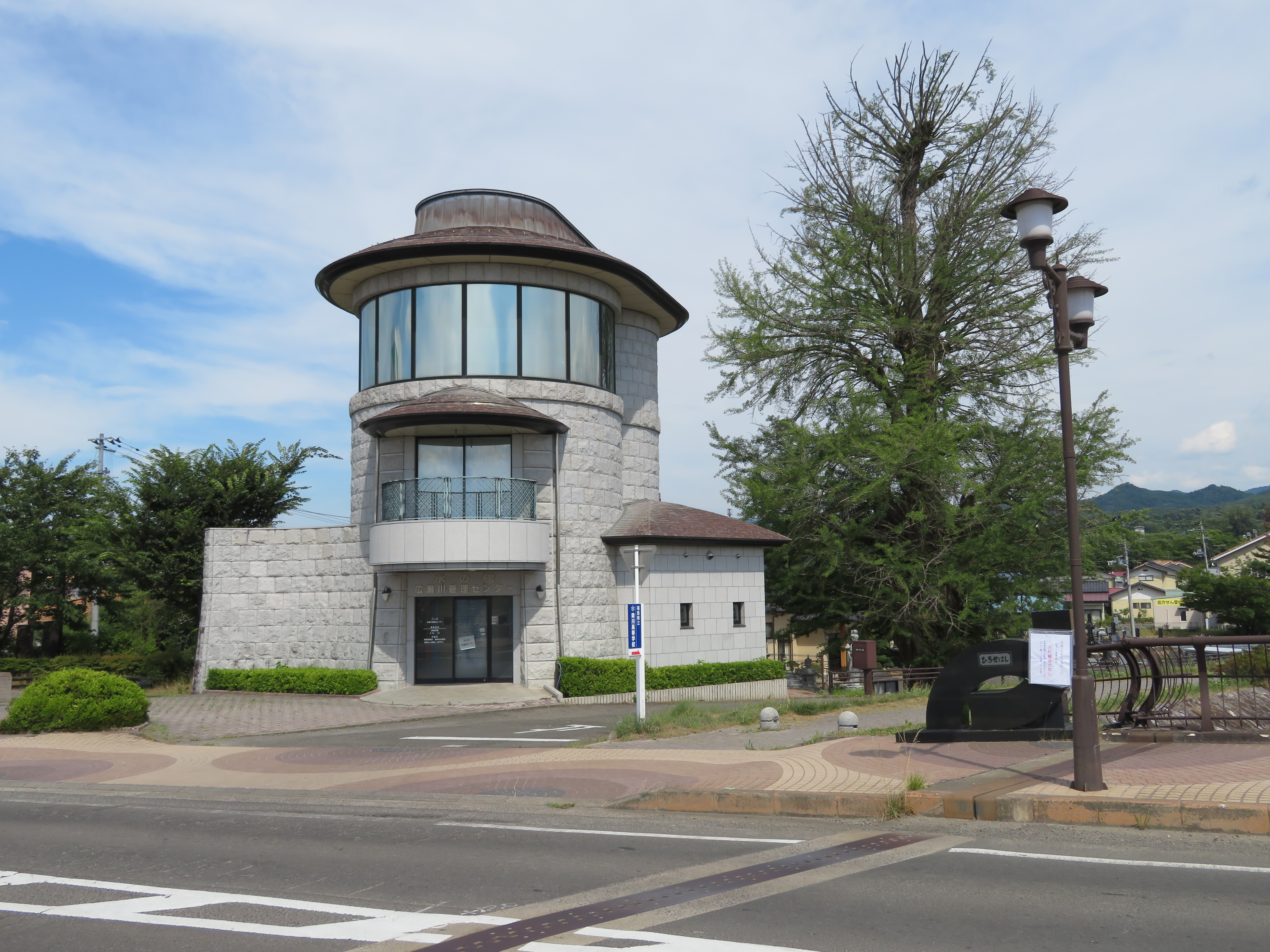 福島県伊達市広瀬橋傍にある広瀬川管理センター Canon PowerShot SX720 HS